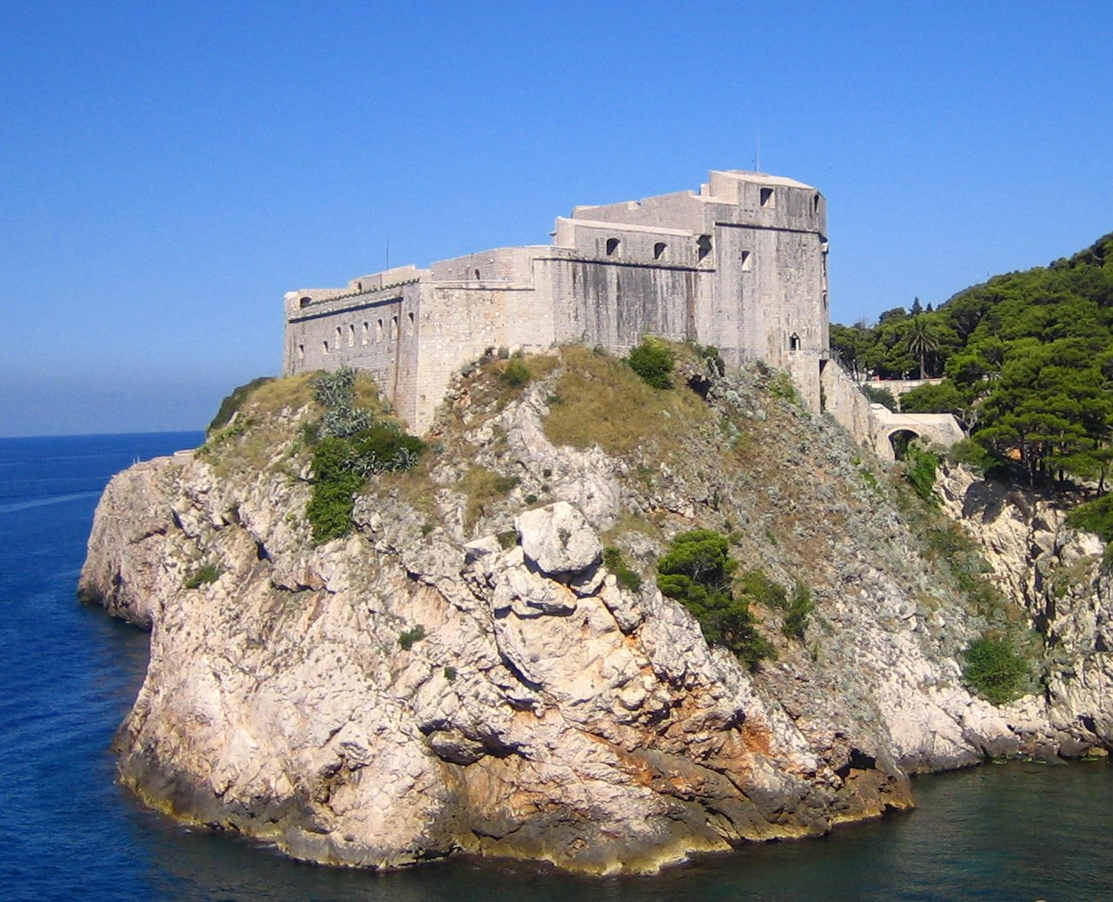 Fort Lovrijenac, Dubrovnik, Croatia